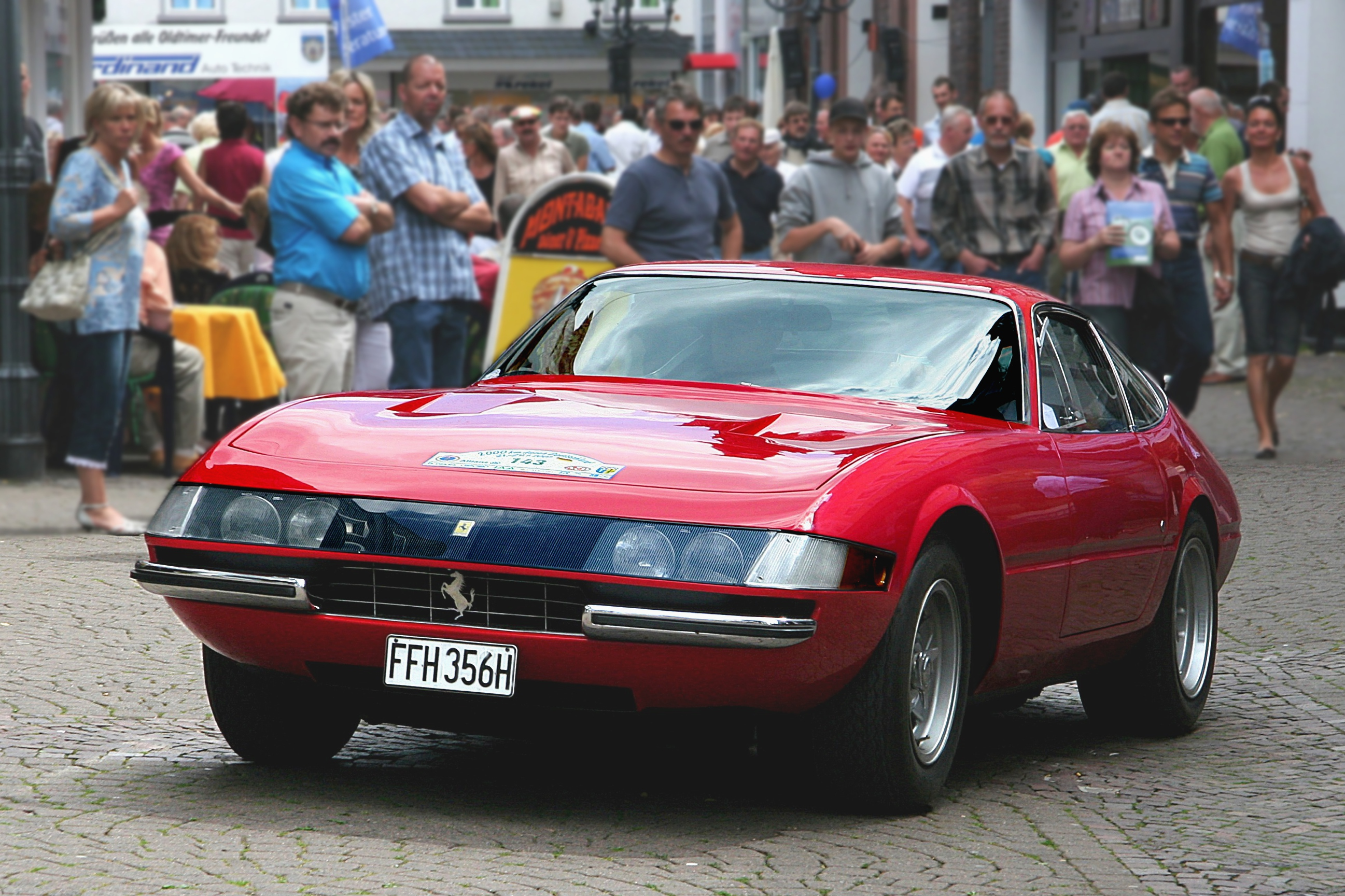 Ferrari 365 GTB 4, Baujahr 1970.